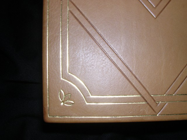 Blindprägung und Handvergoldung nebeneinander auf dem Buchdeckel eines Kalblederbandes. Das Foto des Einbandes ist auf der Seite